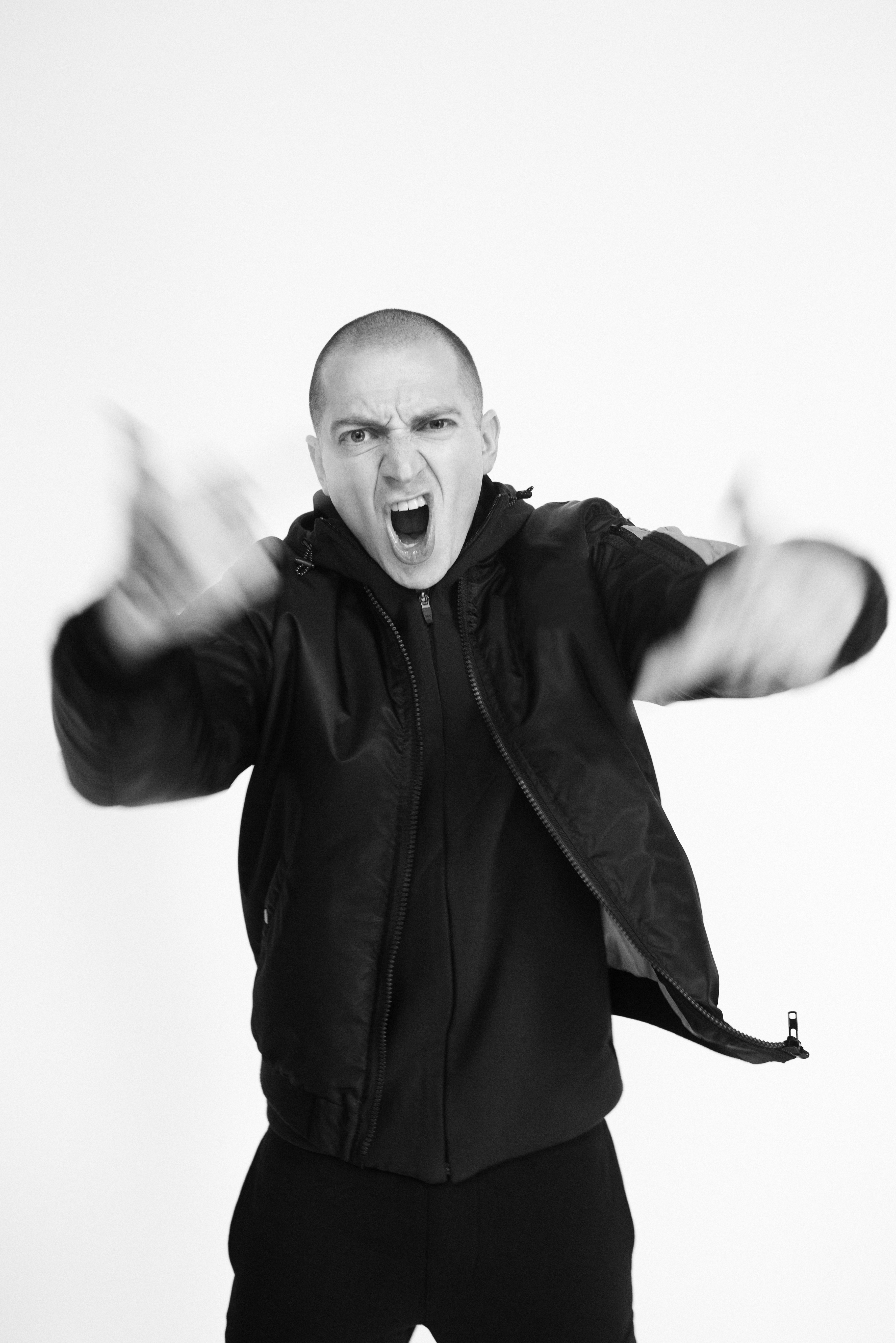 Мирон Фёдоров, также известный как Oxxxymiron